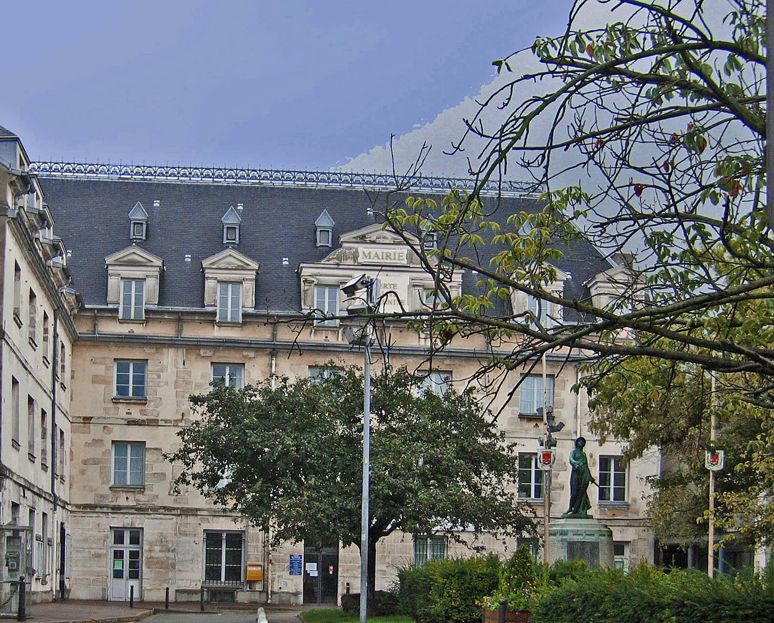 Mairie de Villejuif